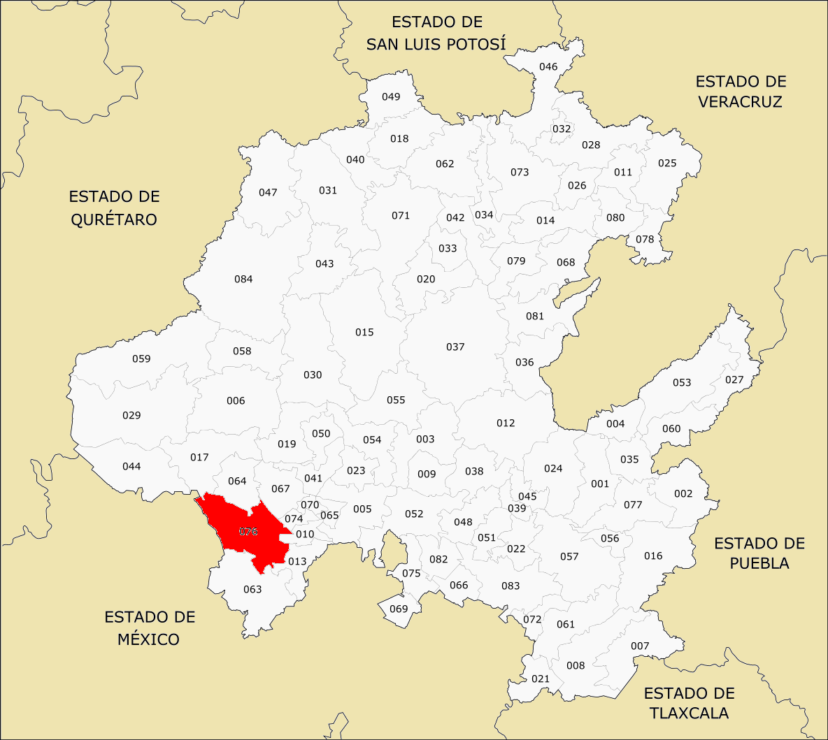 Municipios de Hidalgo